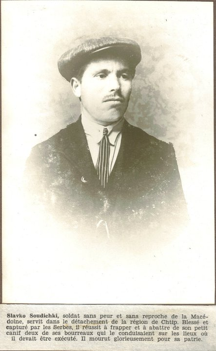 IMRO member Slavko Sudichki from Sudik